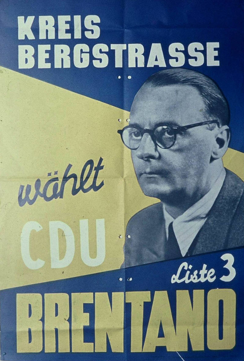 Kreis Bergstrasse wählt CDU Liste 3 BrentanoAbbildung:PorträtfotoPlakatart:Kandidaten-/Personenplakat mit PorträtObjekt-Signatur:10-001: 119Bestand:Plakate zu Bundestagswahlen (10-001)GliederungBestand10-18:Plakate zu Bundestagswahlen (10-001) » Die 1. Bundestagswahl am 14. August 1949 » CDU » Mit PorträtfotoLizenz:KAS/ACDP 10-001: 119 CC-BY-SA 3.0 DE